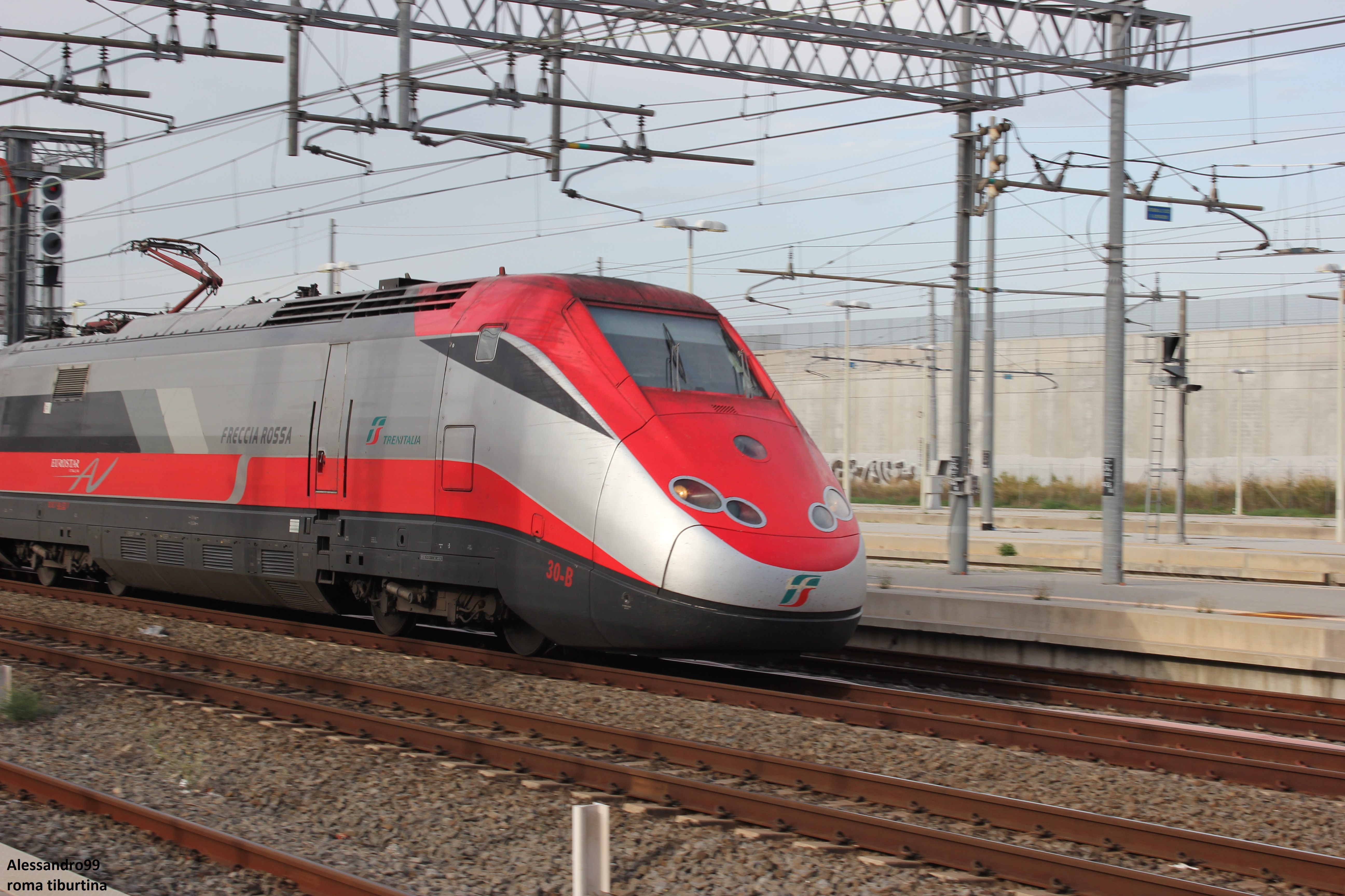 La locomotiva di testa di ETR 500 mentre transita a 120 km/h presso Roma Tiburtina.